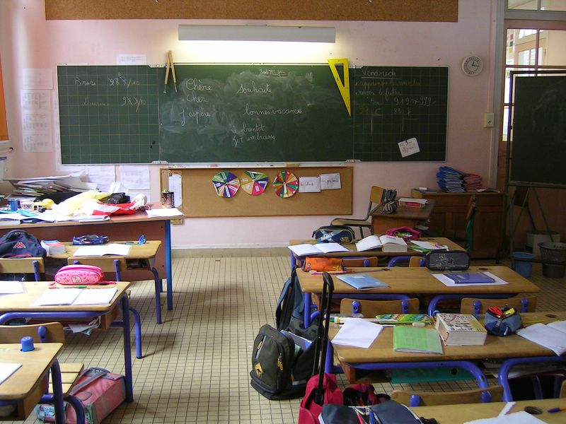 Ecole primaire en France, salle de classe Photo personnelle (own work) de Marianna